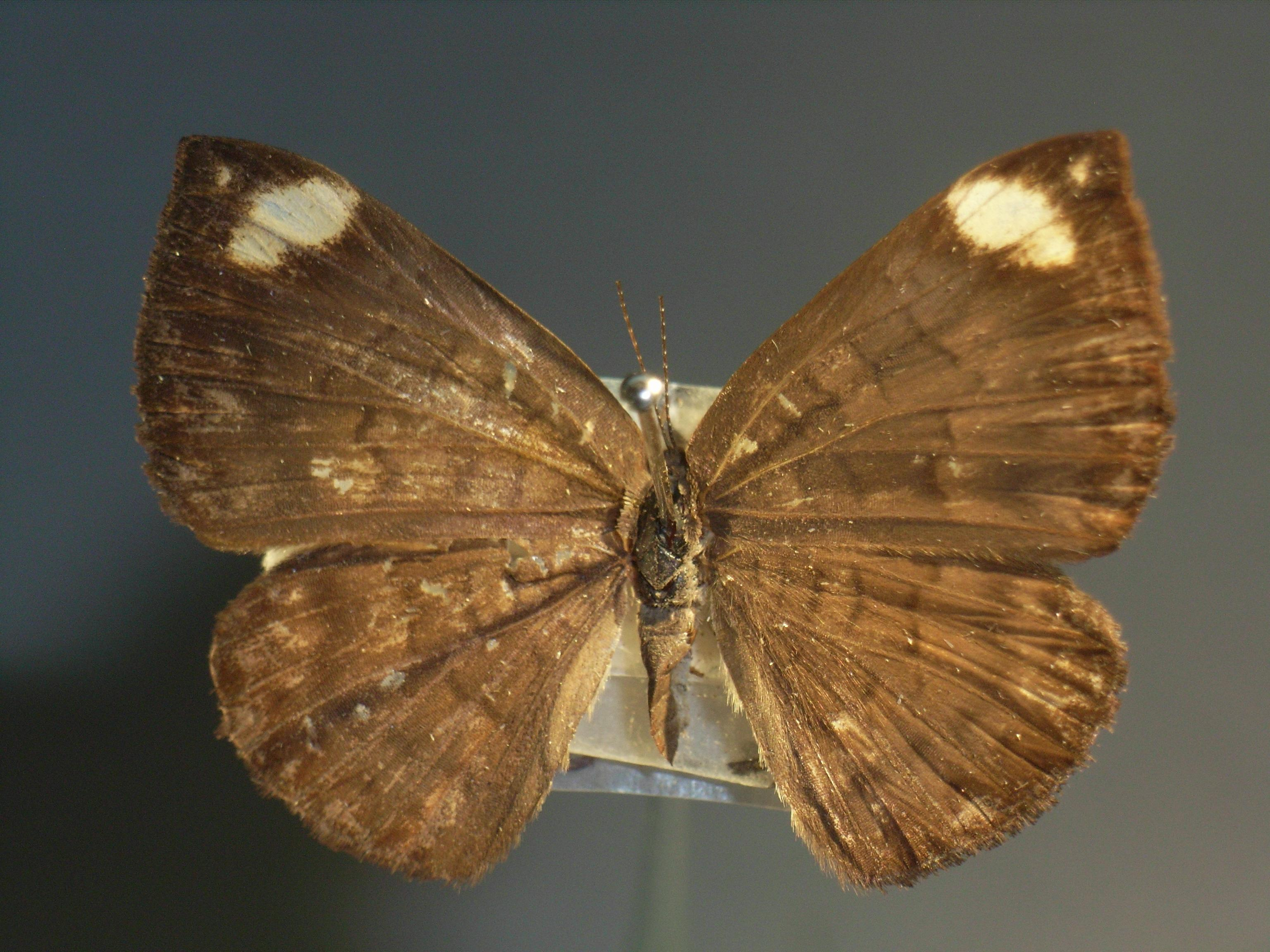 Emesis lucinda